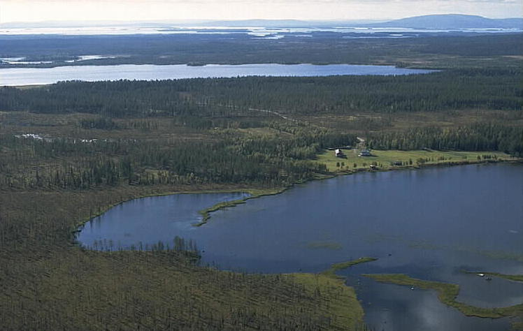 Motiv: Rackträsk-Dellaure Nyckelord: Flygbilder, Riksintressen Kategori: Insjömiljöer Rackträsk-Dellaure